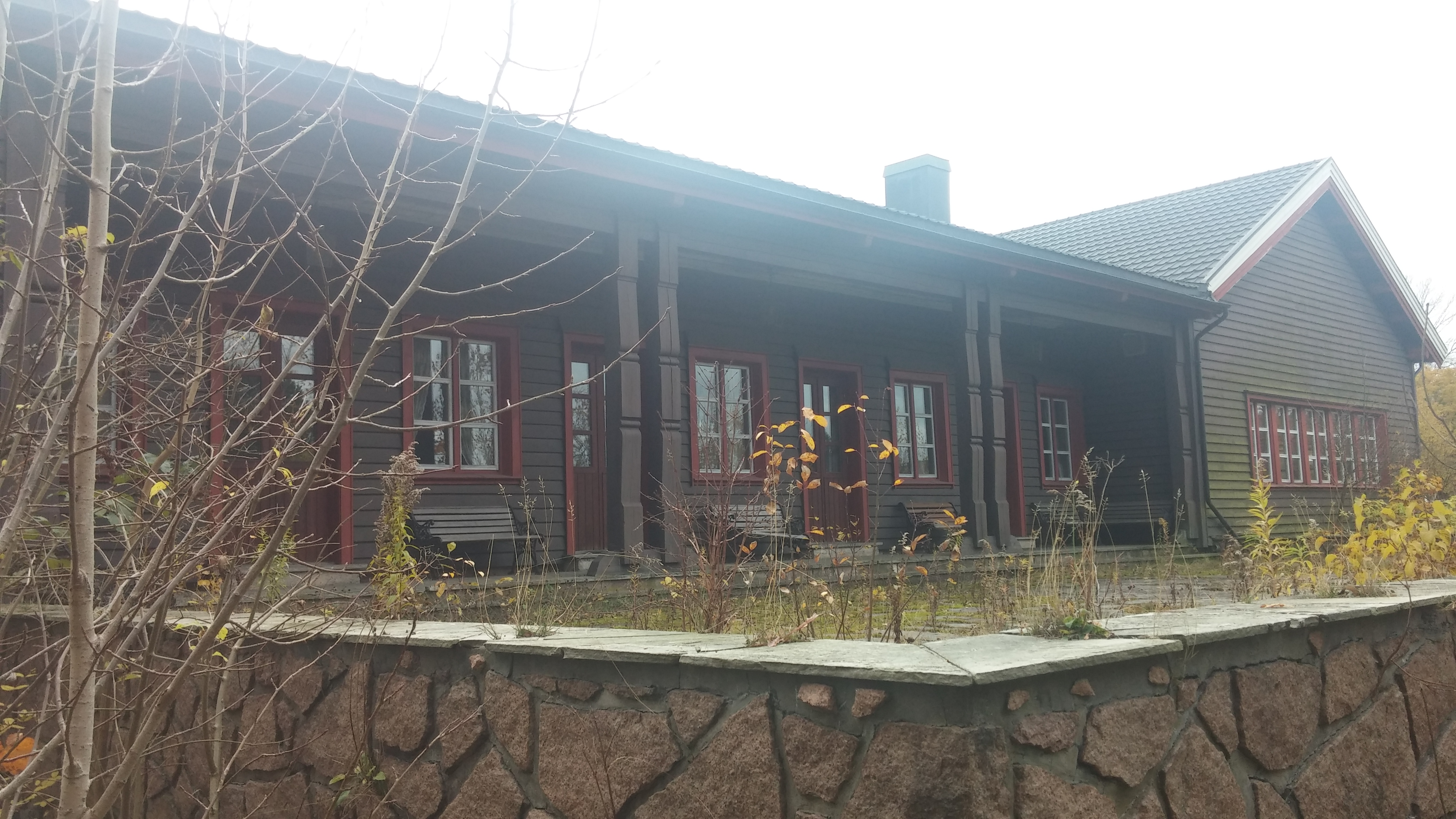 Offisersmessen Casino i Grefsrudleiren ved Holmestrand, bygget av tyskerne under andre verdenskrig, også benyttet til utdannelse av frontkjempere og hirdens vaktmannskaper til fangeleire